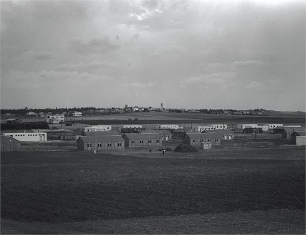 כפר אז"ר - שכון לעולים חדשים ליד כפר אז"ר